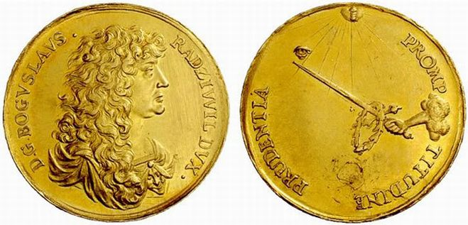 Medal Bogusława Radziwiłła z poł. XVII w.